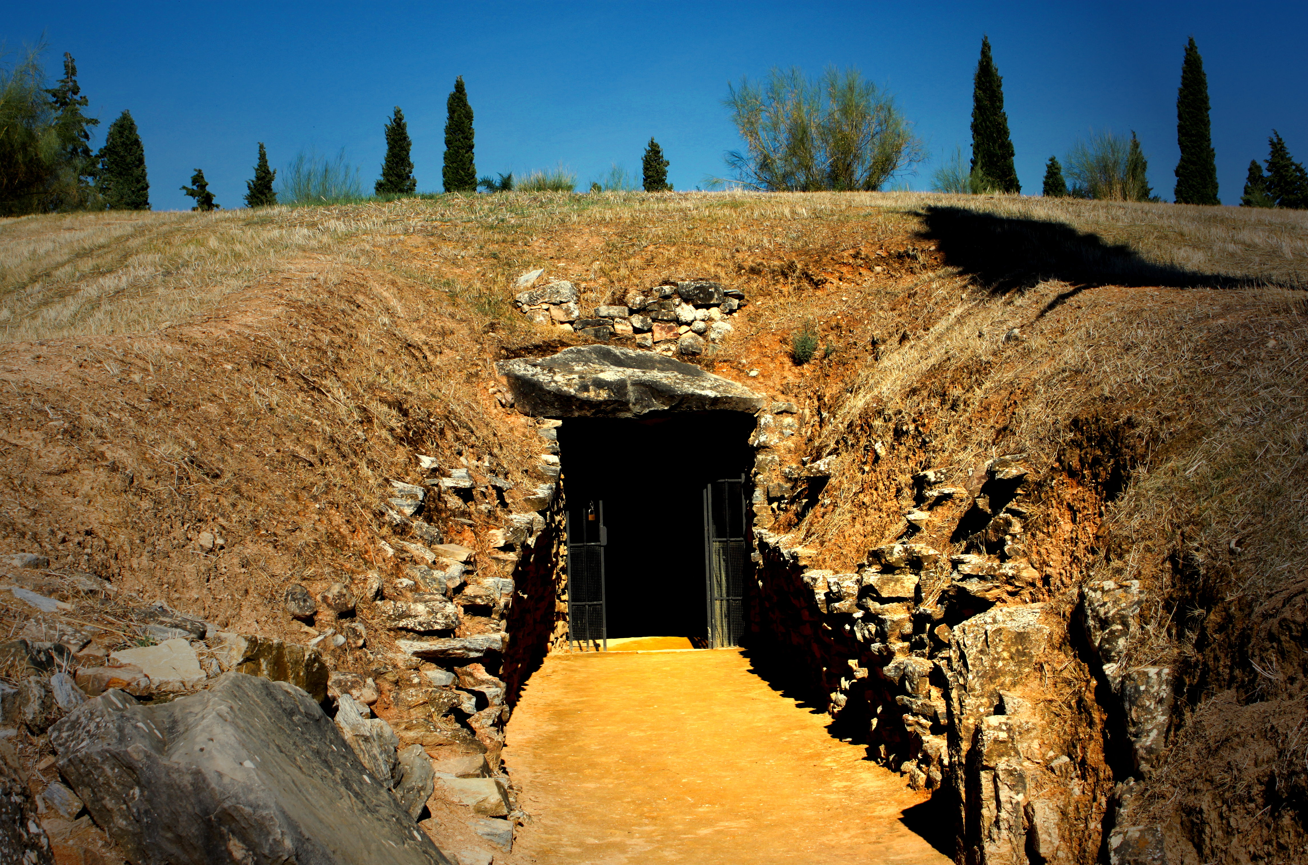 Dolmen Cueva del Romeral Antequera Málaga